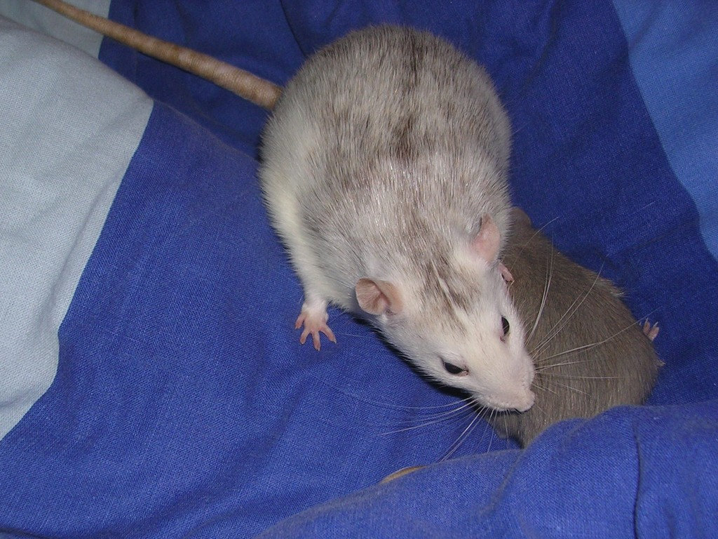 Première rencontre entre deux rates en terrain neutre.